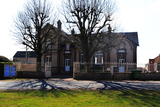 Mairie de Favières